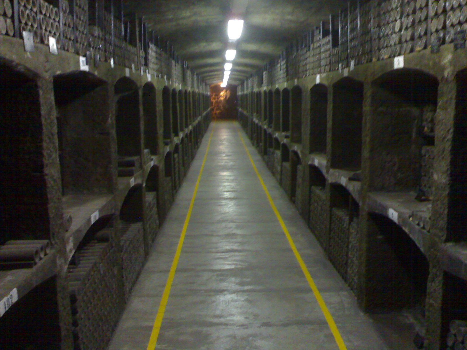 Будівля верхнього підвалу та тунелі верхнього підвалу комплексу винних підвалів « Массандра», Масандра, вул. Винороба Єгорова, 9, літер « В»